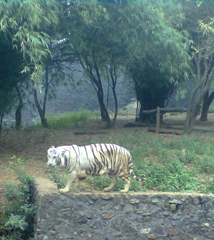 own shot வேங்கை வரிப்புலி